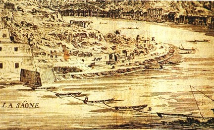 Lyon. « La Veue de Lion descendat par la Saosne » (« La vue de Lyon descendant par la Saône »), détail. Gravure par Israël Sylvestre, 1649-1650. Musée historique de la ville de Lyon, n° d'inv. 3383.7. Vue depuis la rive droite, vers l'aval de la Saône, avec en rive droite (au fond) le quai Pierre Scize (noter le grand nombre de maisons bâties au raz de la rivière). En rive gauche, entre le couvent Ste-Marie-des-Chaînes (E) et le fort Saint-Jean (vu en partie contre le bord gauche de l'image), seules quelques maisons bordent la voie qui longe la rive. Le Grenier d'abondance n'est construit que dans les années 1720. Les bateaux reliés en travers de la Saône soutiennent l'une des chaînes qui barrent la rivière contre les incursions de malfaiteurs. Celle-ci est appelée "sainte-Marie-aux-Chaînes". Elle relie le fort Saint-Jean au pied du château de Pierre Scise et a donné son nom au couvent mentionné plus haut. L'autre chaîne est la chaîne de Saint-George, plus haut sur la rivière.